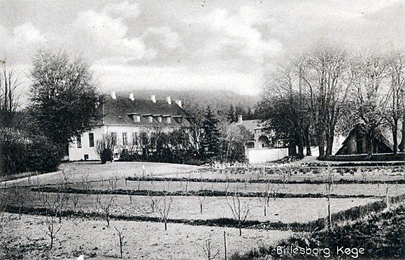 Billesborg ved Egøje, Køge. Affotograferet fra antikveret postkort.